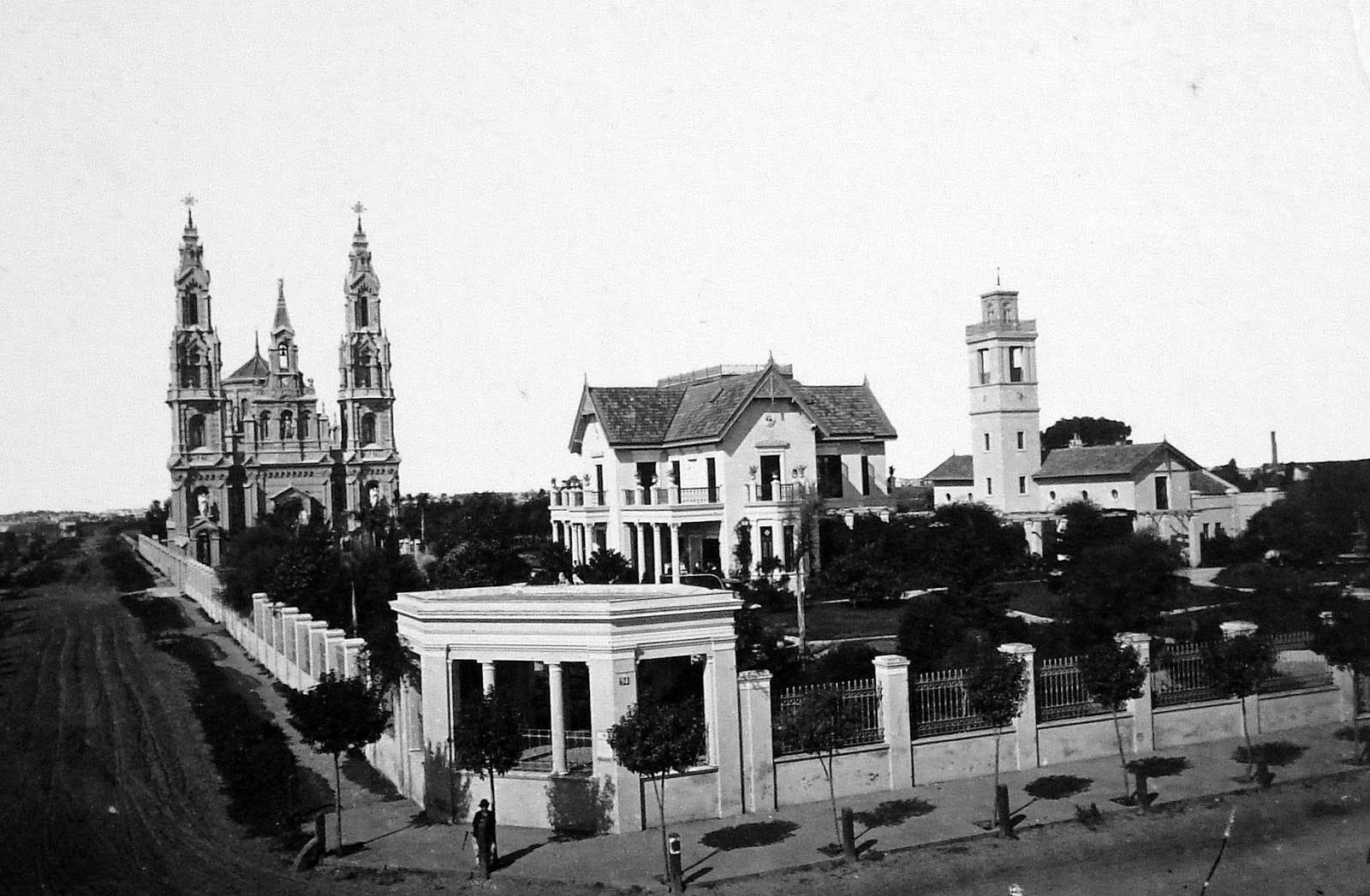 Quinta de la familia Guerrero (antes fue de Martín de Álzaga) en la actual Avenida Montes de Oca entre las actuales calles Pinzón y Brandsen, en Buenos Aires. Demolida en 1937 para abrir la Plaza Colombia. Atrás, la Iglesia de Santa Felicitas inaugurada en 1876.